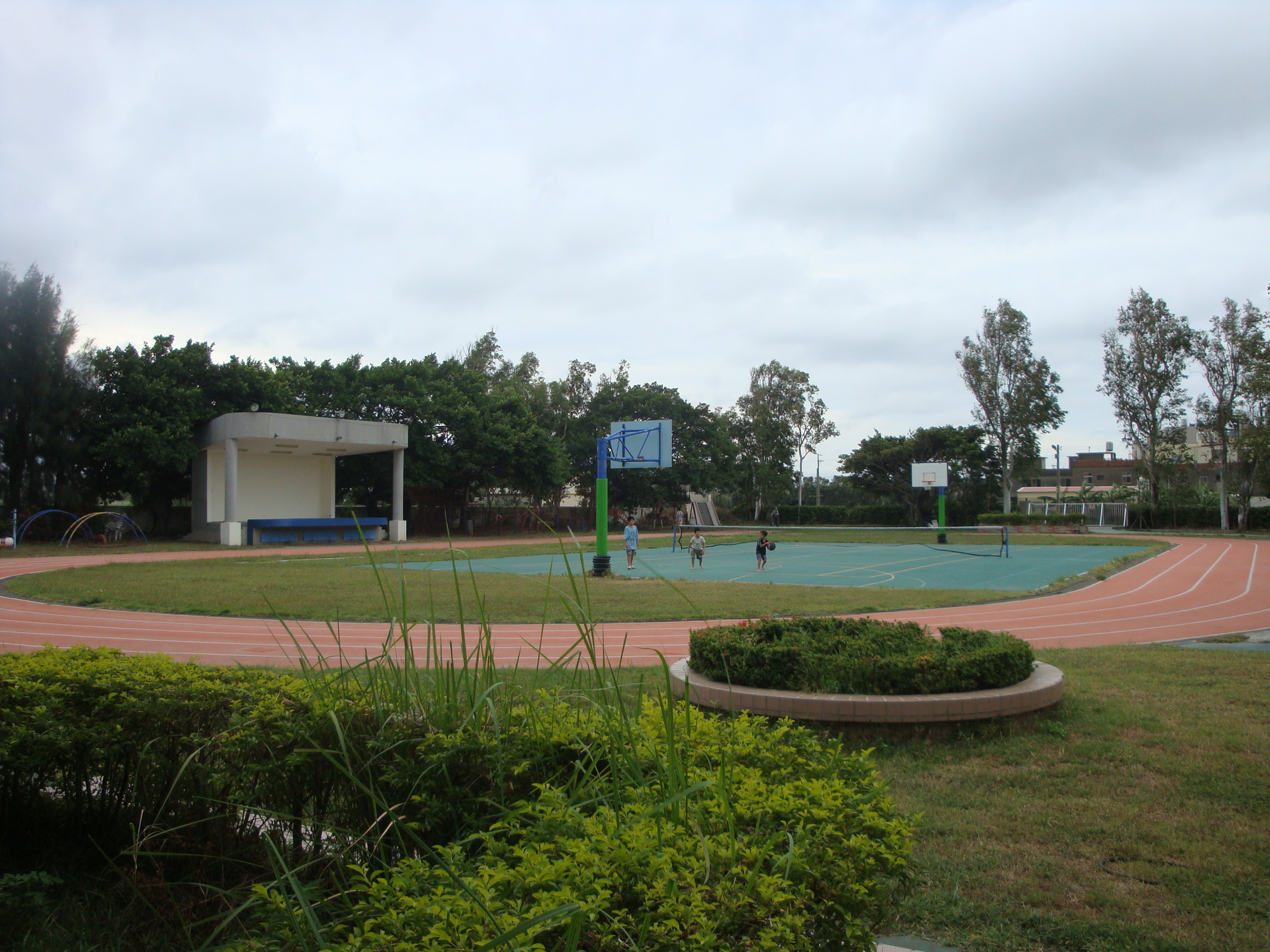 從運動場北側南望